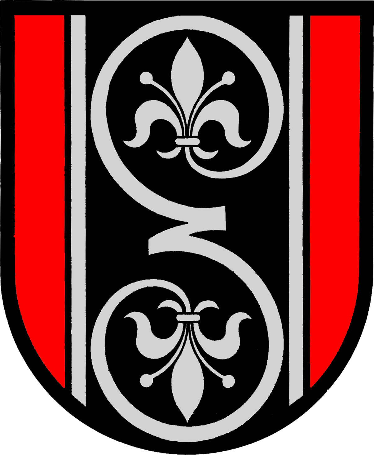 Wappen der Gemeinde Schöder in Österreich